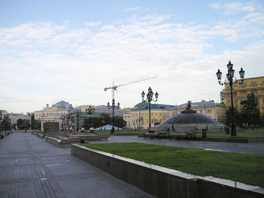 Manezhnaya Square in Moscow